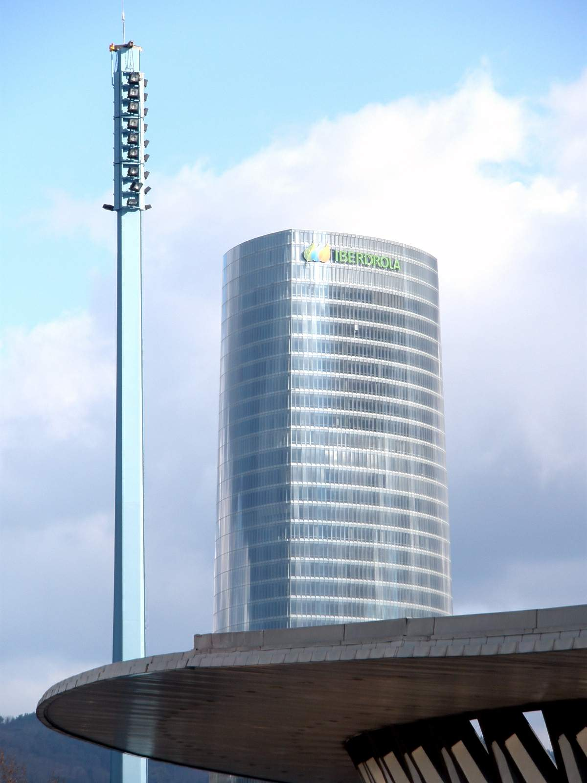 Bilbao - Torre Iberdrola y Puente Euskalduna